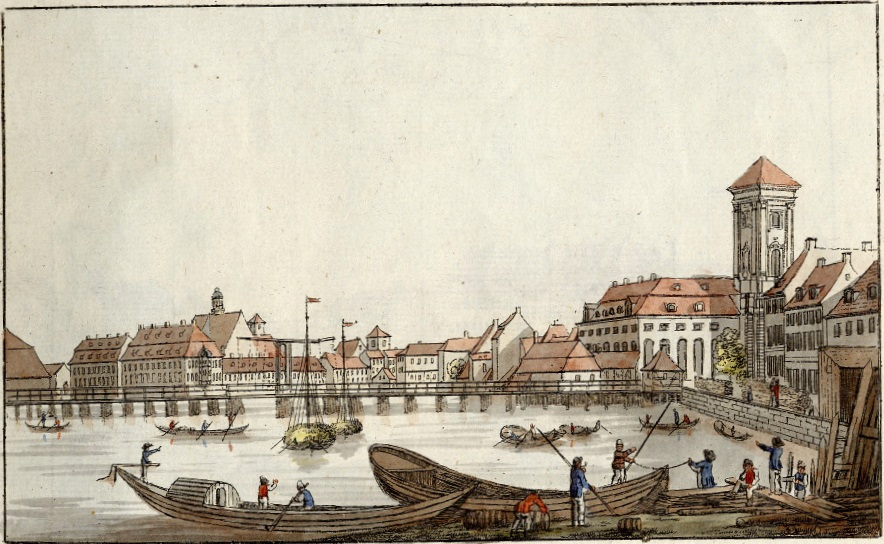 Die Waysenhausbrücke um 1782, Umrissradierung (koloriert)